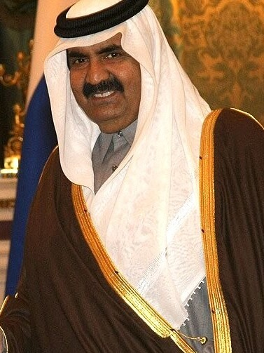 Хамад бин Халифа ат-Тани